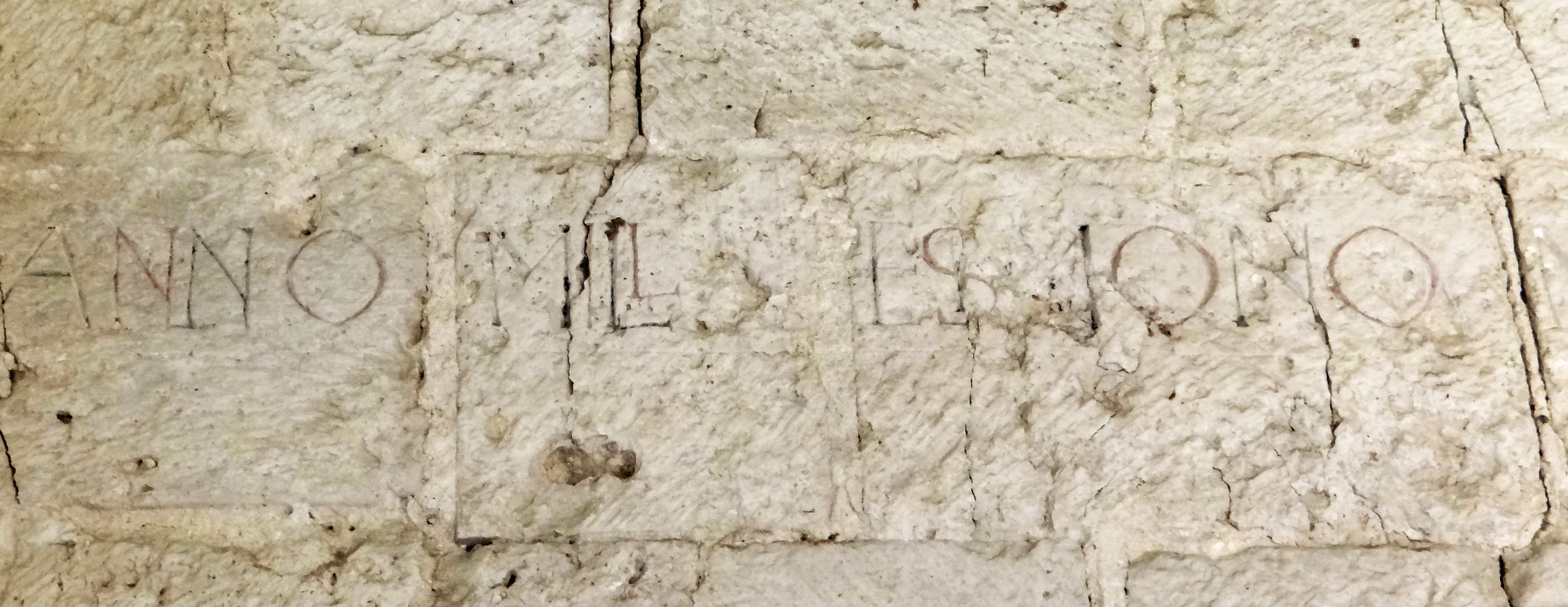 Abbaye de Saint-Maurin - Croisillon sud : Inscription au-dessus de la porte Anno 1097